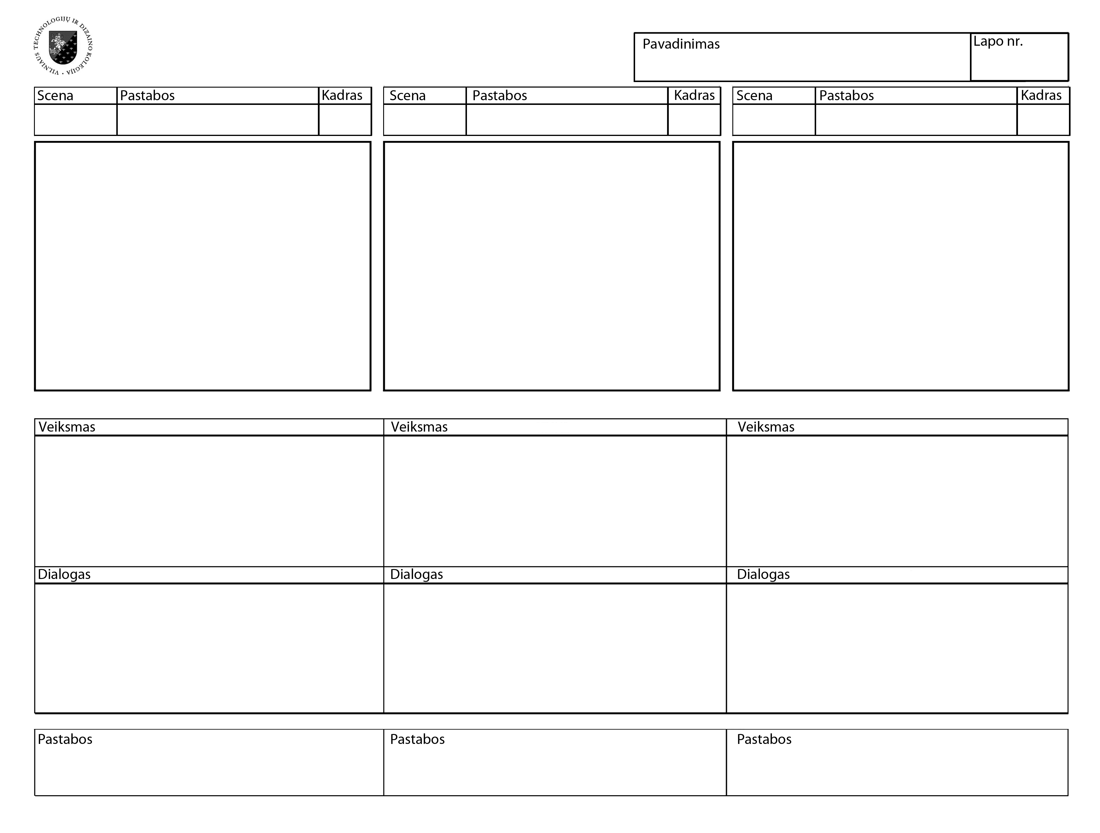 Kadruočių lapas naudojamas audio vizualaus darbo kompozicijai ir sekai organizuoti. Šis lapas paimtas iš Vilniaus Technologijų ir Dizaino kolegijos Fotografijos technologijų kurso, operatorių šakos.